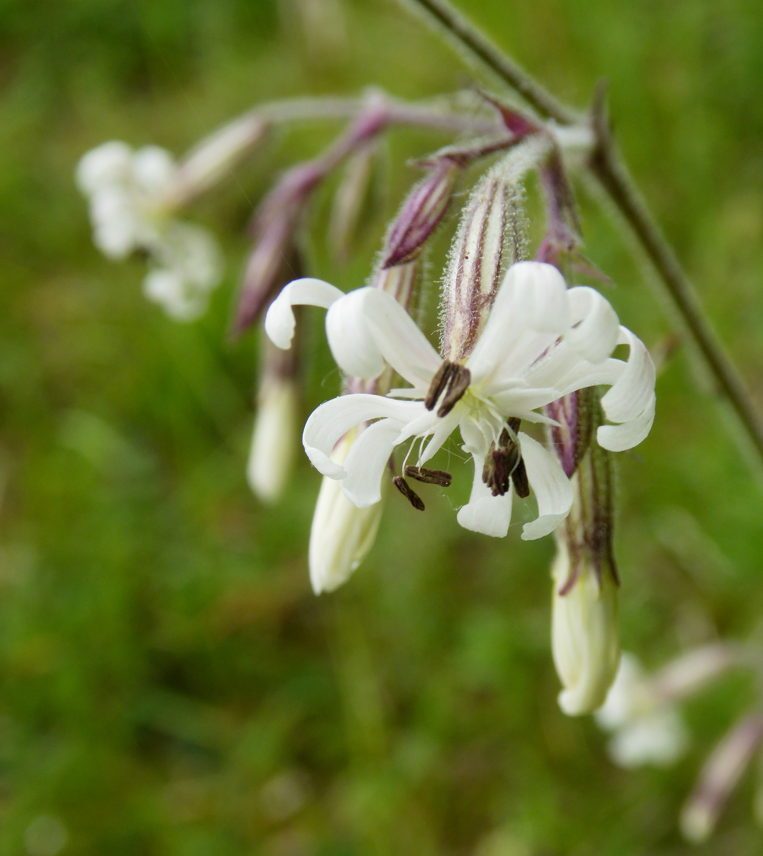 Nickendes Leimkraut an der Aschenburg bei Harste, FFH-Gebiet und Teil des Landschaftsschutzgebietes Leinebergland im Landkreis Göttingen (Niedersachsen, Deutschland).